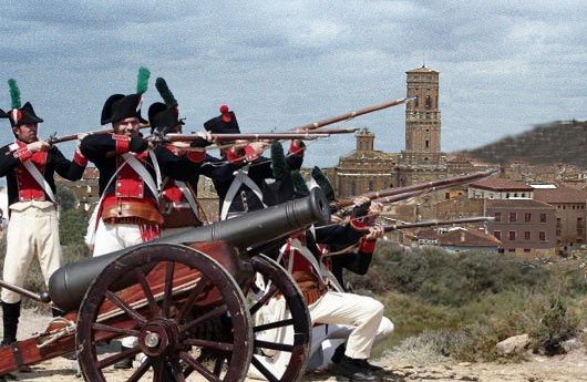 Recreación de la batalla de Tudela 1808, soldados voluntarios de Aragón